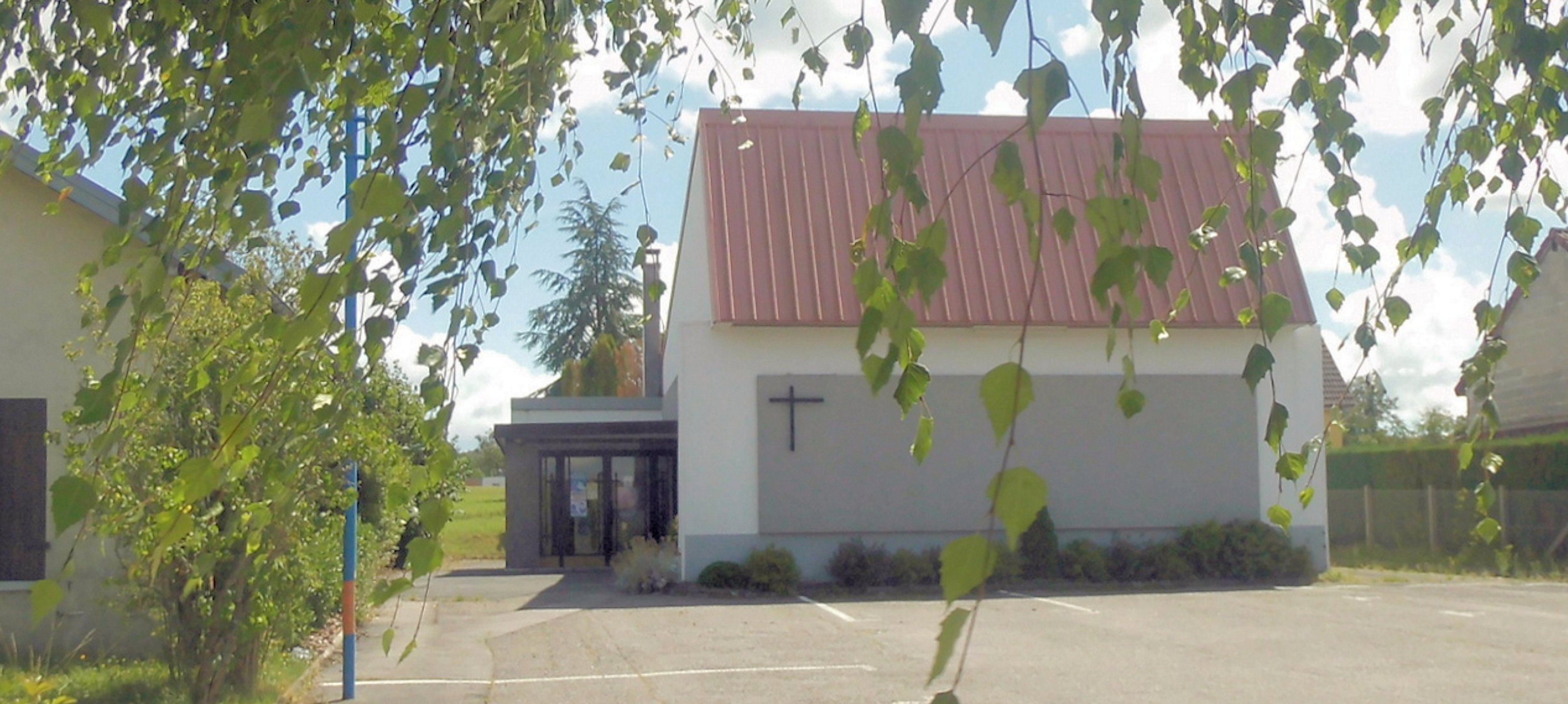 L'église Saint-Éloi des Forges